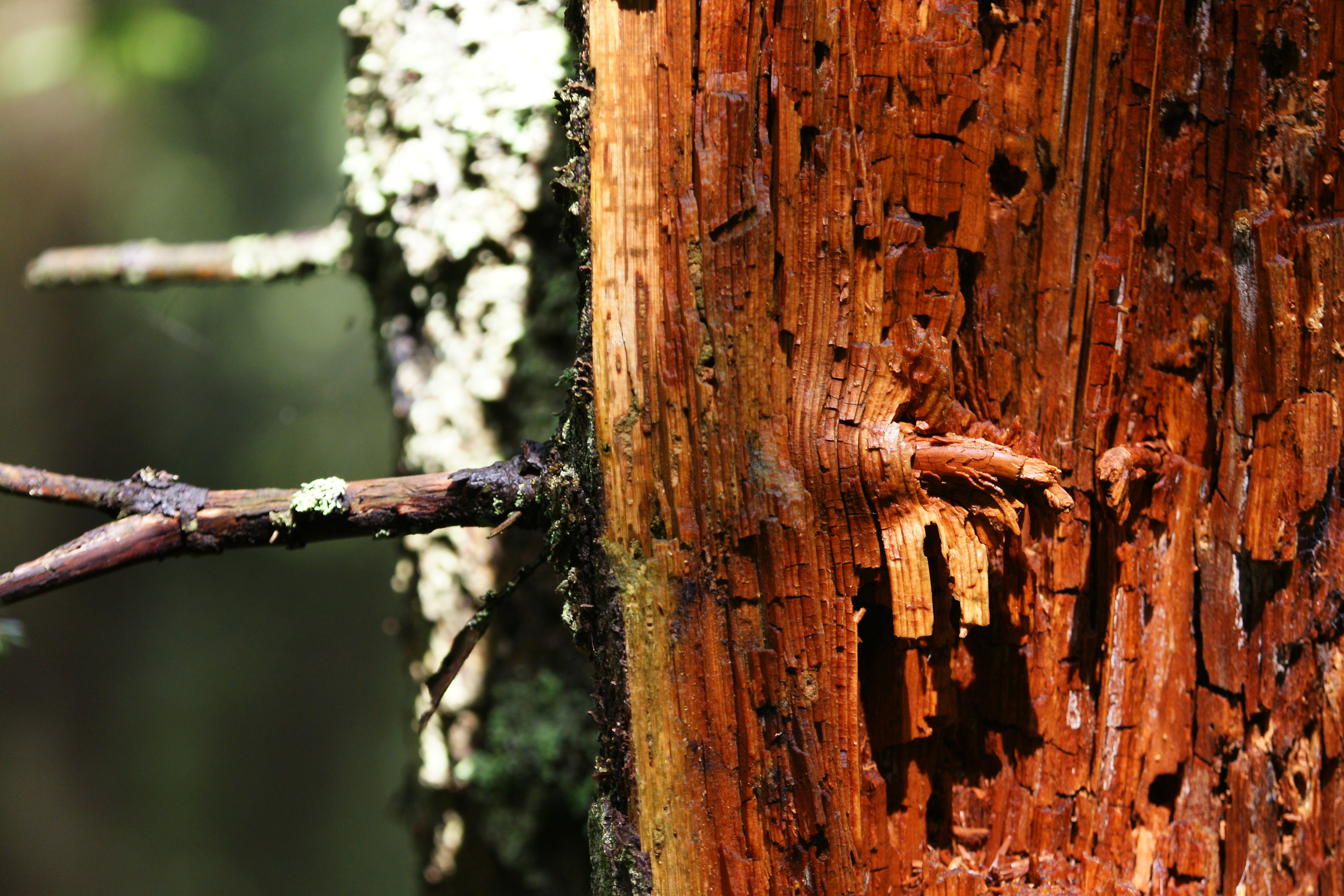 Ein Ast ist ein Teil der Wuchsform des Baumes. Er verbindet den Stamm mit seinen Zweigen und Blättern. Dieser Baum vermodert nach einem Blitzschlag. Gesehen in Hohenems.